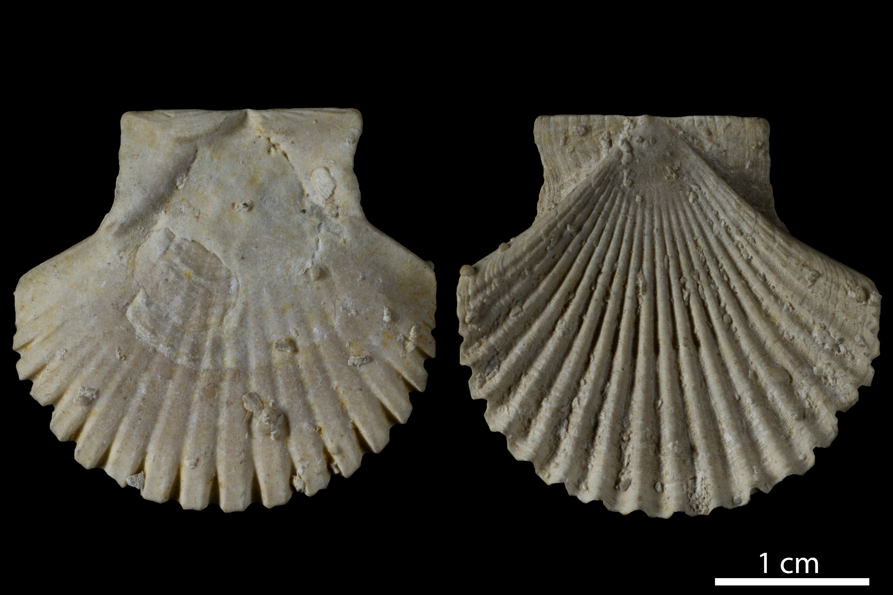 Fossile de l'espèce Pecten sylvestreisacyi.